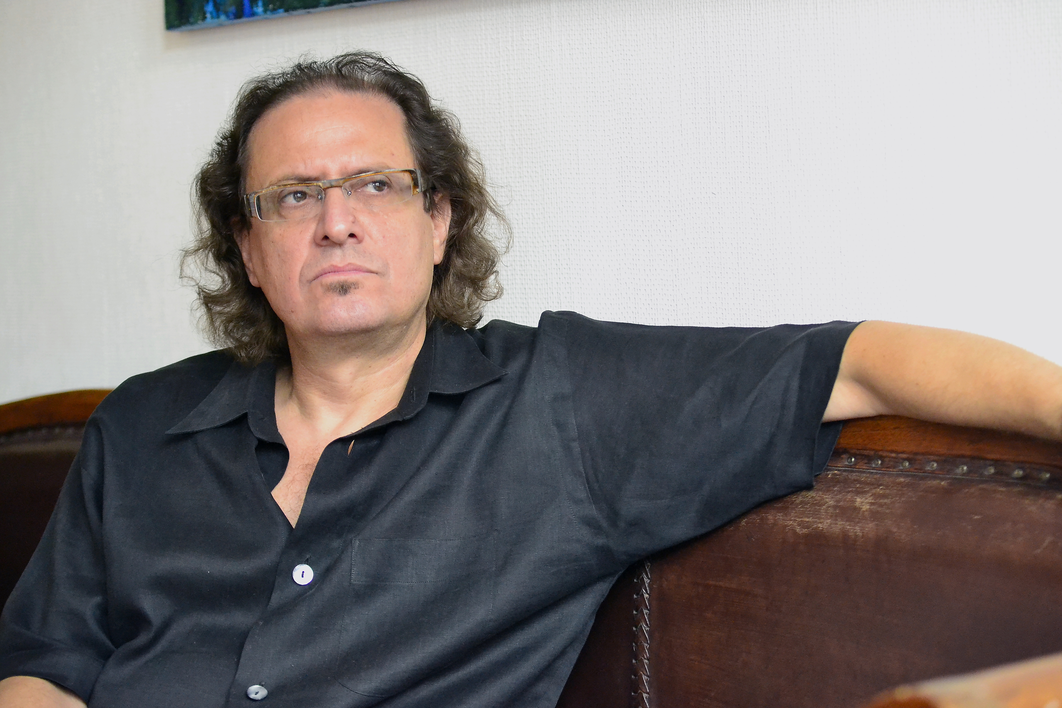 Portrait von Kostas Papakostopoulos im Jahr 2014